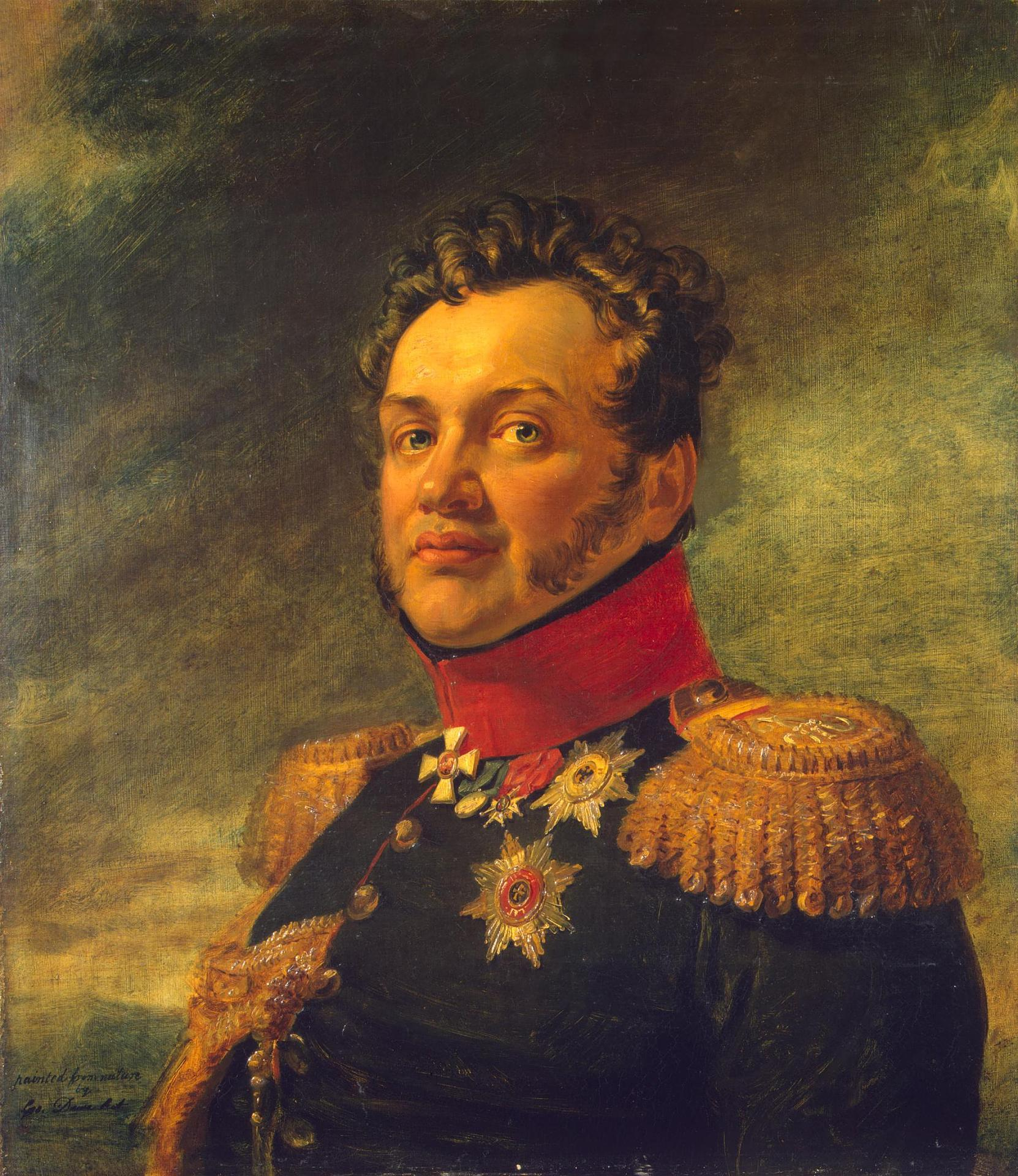 Nikolay Grigorievich Repnin-Volkonsky (1778 – 06.01.1845) russian general